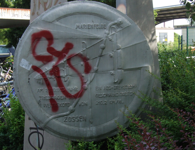 Erinnerung an den Weltrekord vor dem Bahnhof Marienfelde mit zeitgemäßer Verzierung Fotograf: Harald Rossa Datum: Juni 2006 Höher aufgelöste Version ist verfügbar